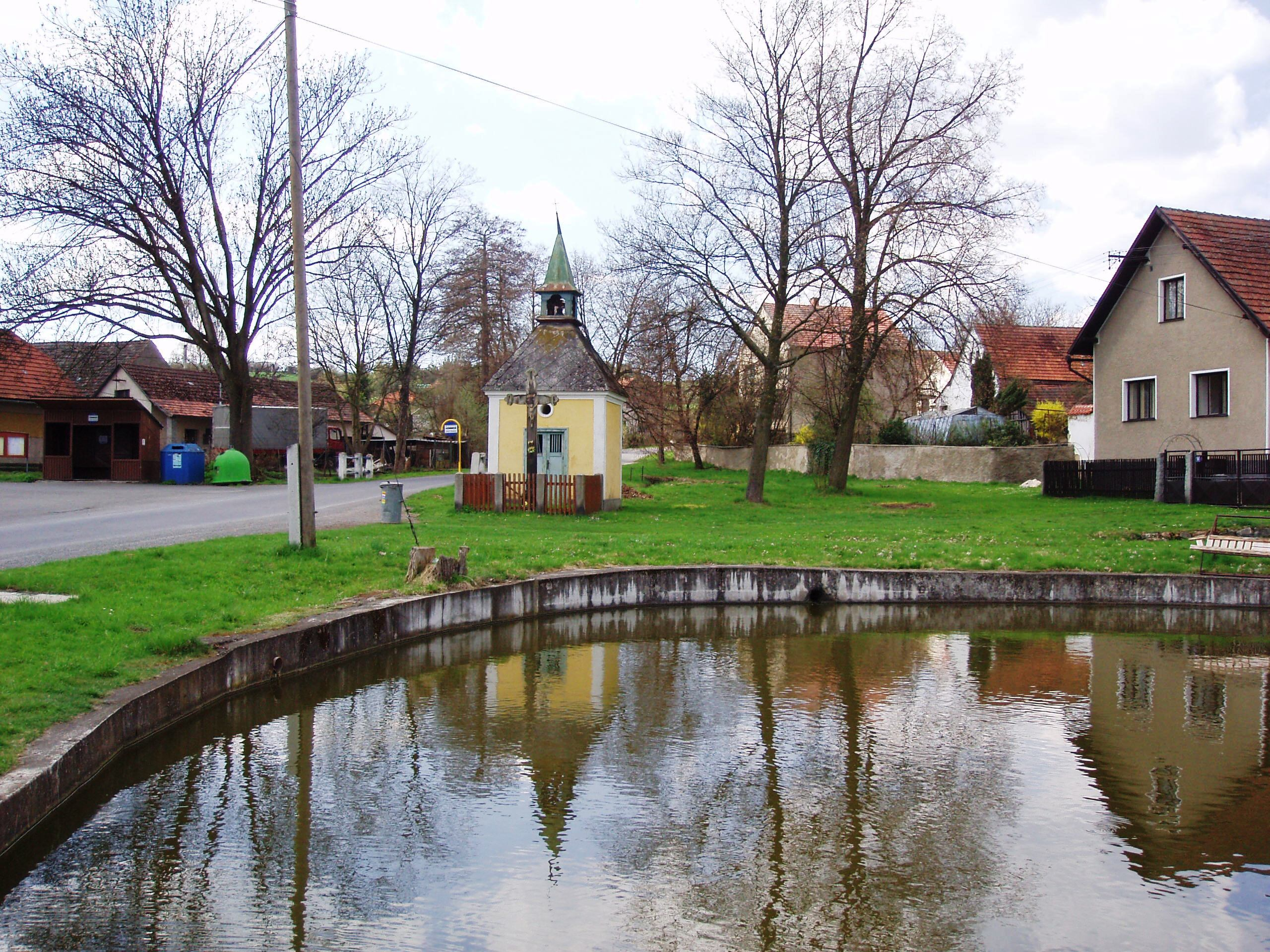 Káciň náves